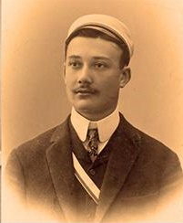 Fotografie von Rolf Grabower als Aktivem des Corps Masovia Königsberg